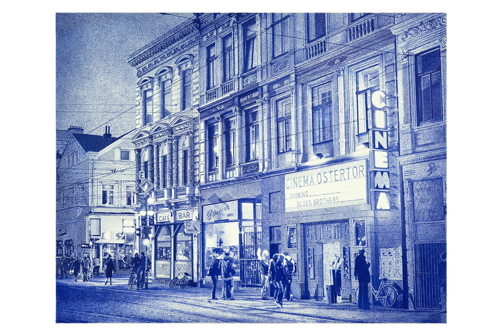 'Kiez', 28203 - Bic-Kugelschreiber auf Leinen, 120 x 150 cm, 2016